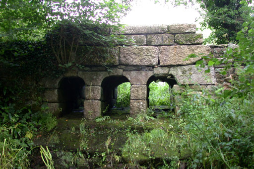 Description : Callac (22) - Le pont Gallo romain Date : juillet 2004 Auteur : Ifernyen Source : Archives personnelles Statut : GFDL Ifernyen